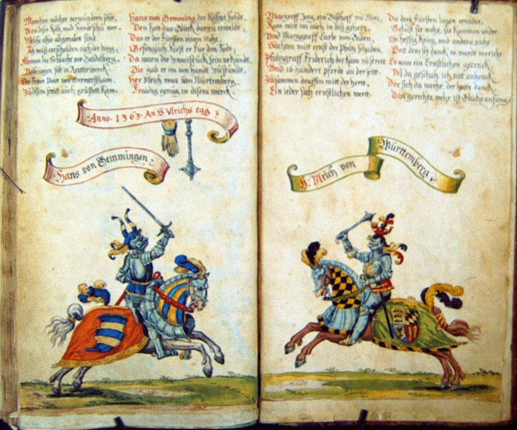 Darstellung des Sieges über Graf Ulrich von Württemberg durch Hans den Kecken im Gemmingenschen Stamm- u. Turnierbuch mit falschem Datum (und falschem württembergischem Wappen). Eigentümer: Dajo von Gemmingen-Hornberg, Archiv Burg Hornberg